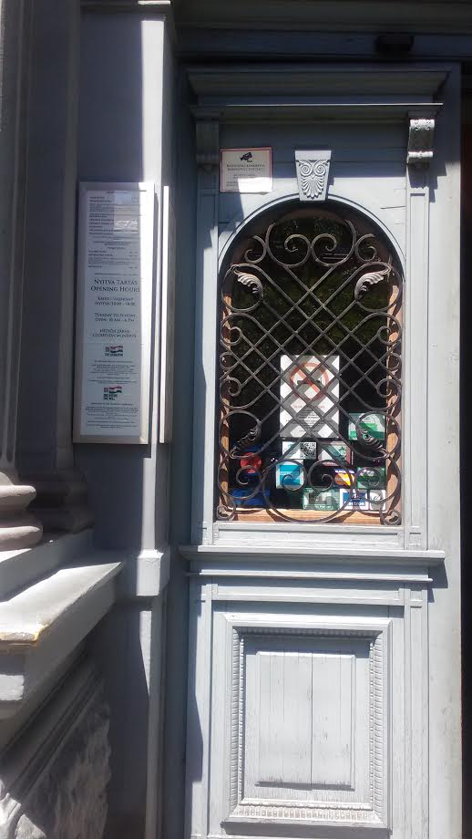 הכניסה למוזיאון